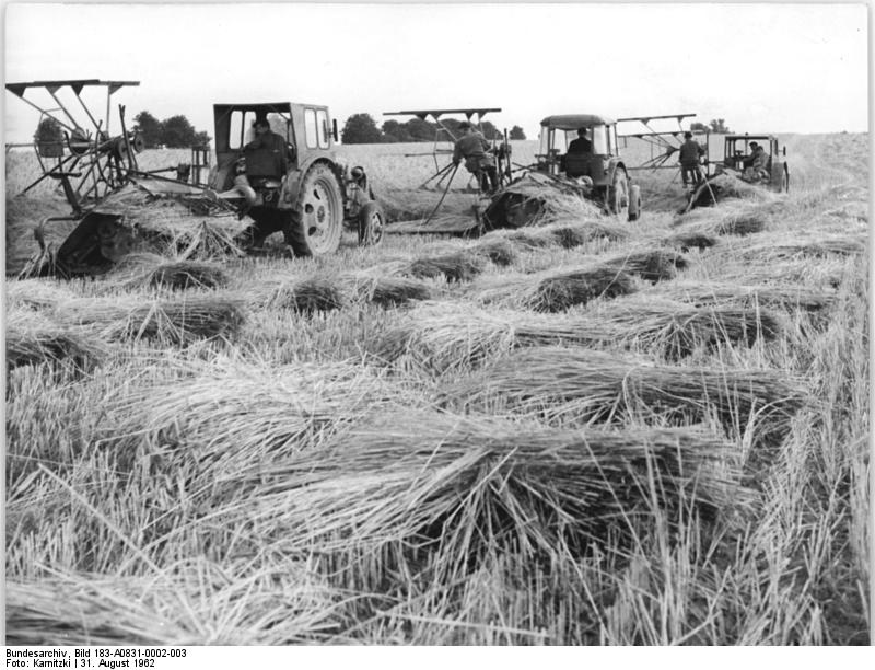 Wendelsdorf, Getreideernte mit Mähbindern Zentralbild Karnitzki-Nl-Le 31.8.1962 MZS Wendelsdorf hilft dem VEG-Groß-Britz, Kreis Schwerin-Land. Mit drei Mähbindern und drei Traktoren unterstützte die MTS Wendelsdorf das VEG Groß-Britz, Kreis Schwerin-Land in einem zweitägigen Ernteeinsatz einen 24 ha Roggenschlag Roggen zu mähen. UBz: Die MTS Traktoristenbrigade aus Wendelsdorf, Helmut Bendlen, Hasso Fläming und Walter Reichenberg, beim Mähbinden auf dem 24 ha Roggenschlag.